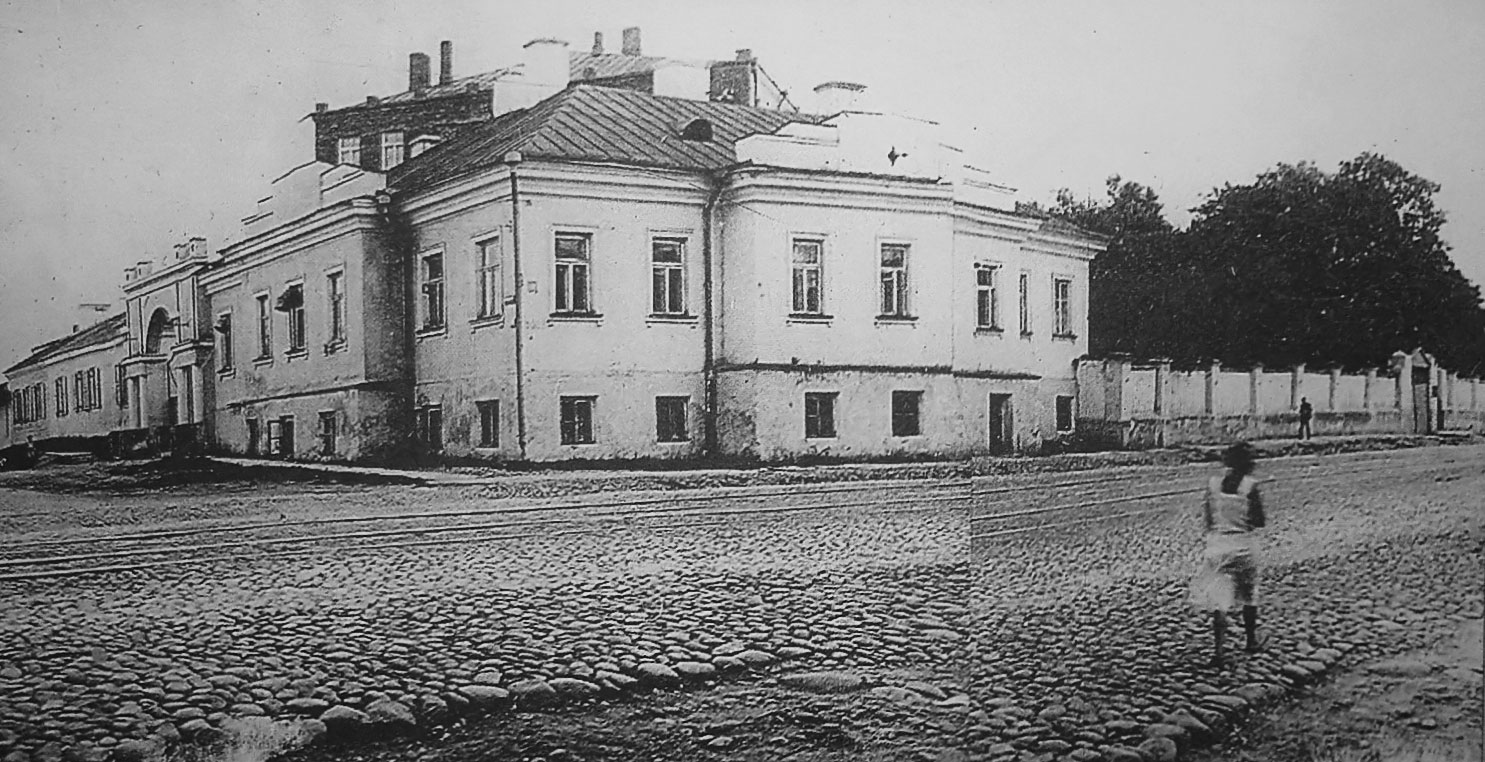 Беларуская (тарашкевіца): Менск (Miensk), Траецкая гара (Trajeckaja hara). Рог вуліц Траецкай (vulica Trajeckaja) і Вялікай Барысаўскай (vulica Vialikaja Barysaŭskaja). Траецкі манастыр базылянак